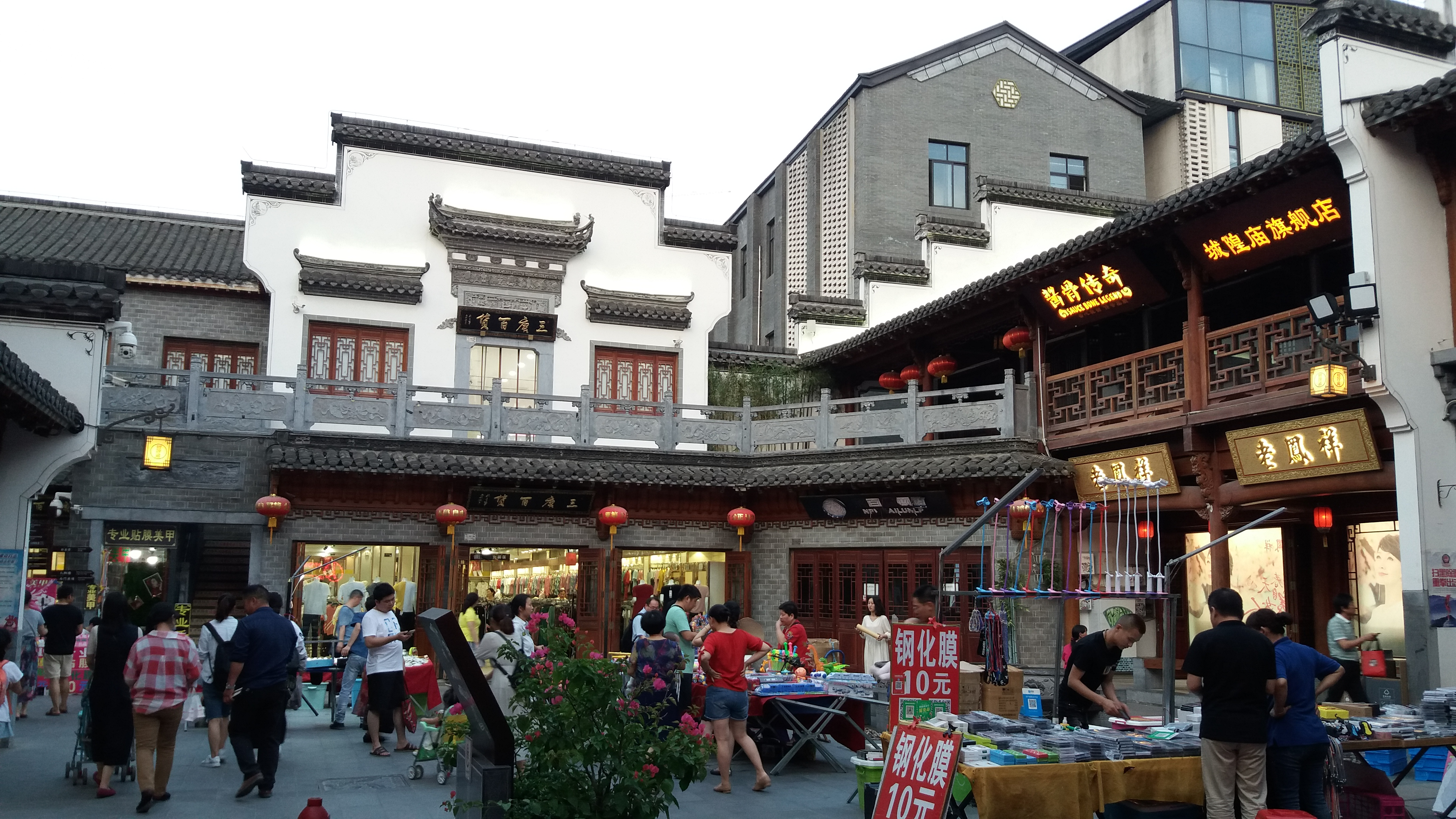 合肥城隍庙市场